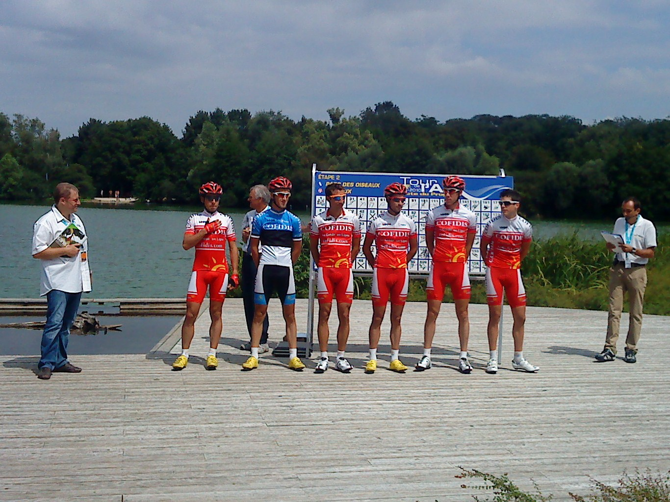 L'équipe Cofidis lors de la présentation avant le départ de la 2e étape du Tour de l'Ain 2010 au Parc des oiseaux de Villars-les-Dombes